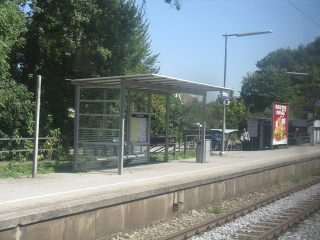 S-Bahnhof Eching (Eching S-Bahn station)